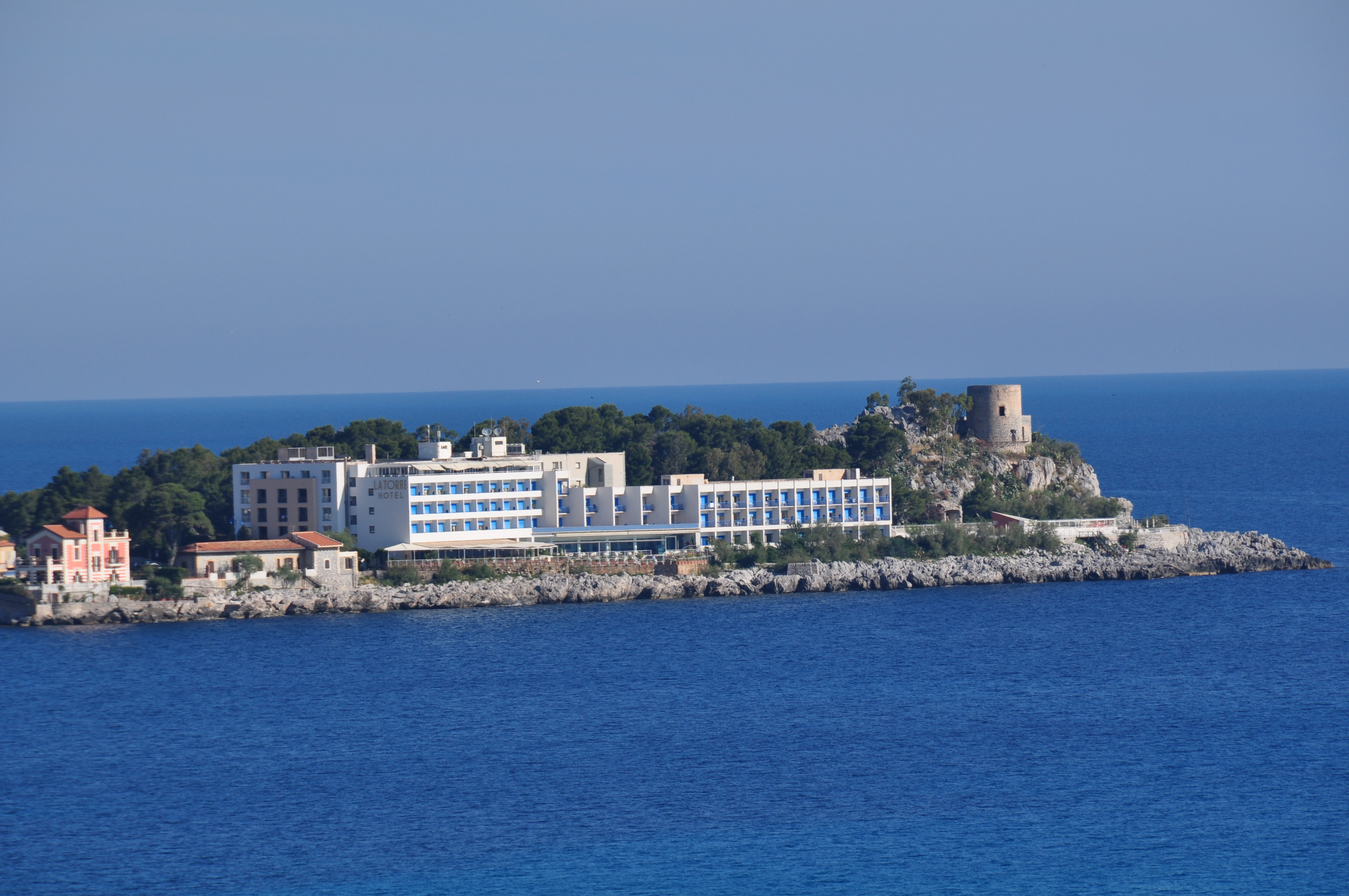 Hotel la torre